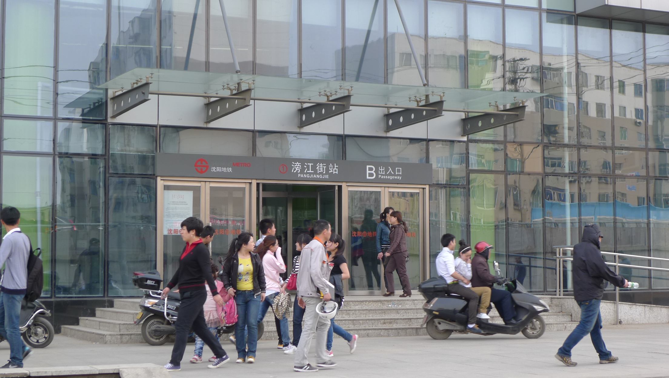 沈阳地铁滂江街站B出入口